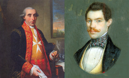 A la izquierda, Antonio Valdés, destacado ex ministro de Marina, luciendo la cruz de la Orden Militar de Malta. A la derecha, Wolfgang de Mucha (1758-1826)